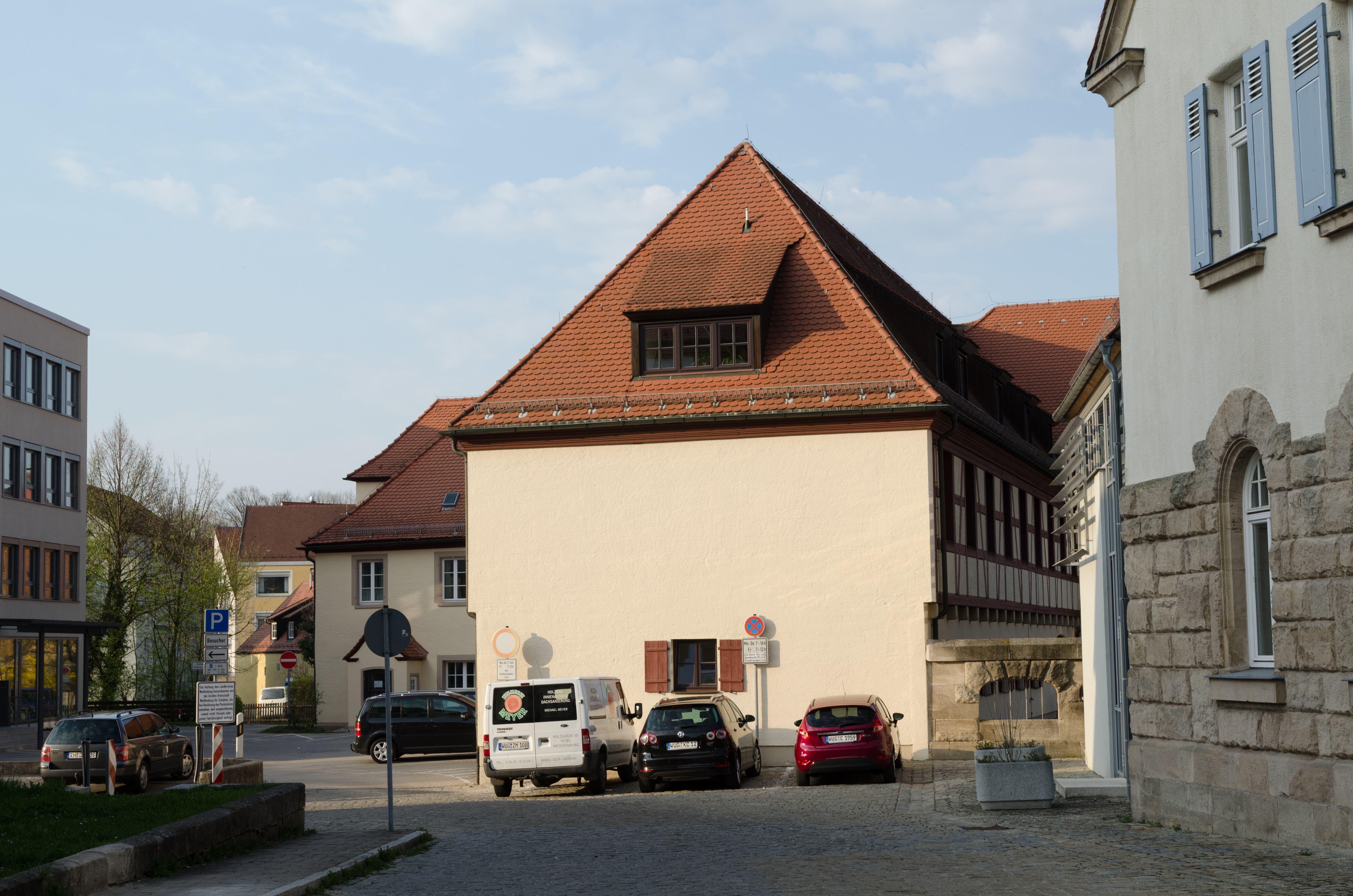 Weißenburg, Bahnhofstraße 2, Landratsamtkomplex